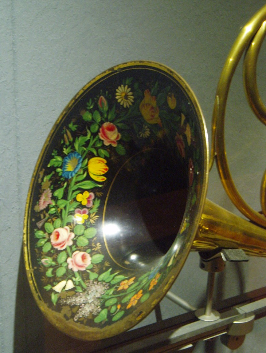 Decorated (painted) Horn Bell, Two valves horn - Paris, circa 1820 - Paris, Musée de la musique